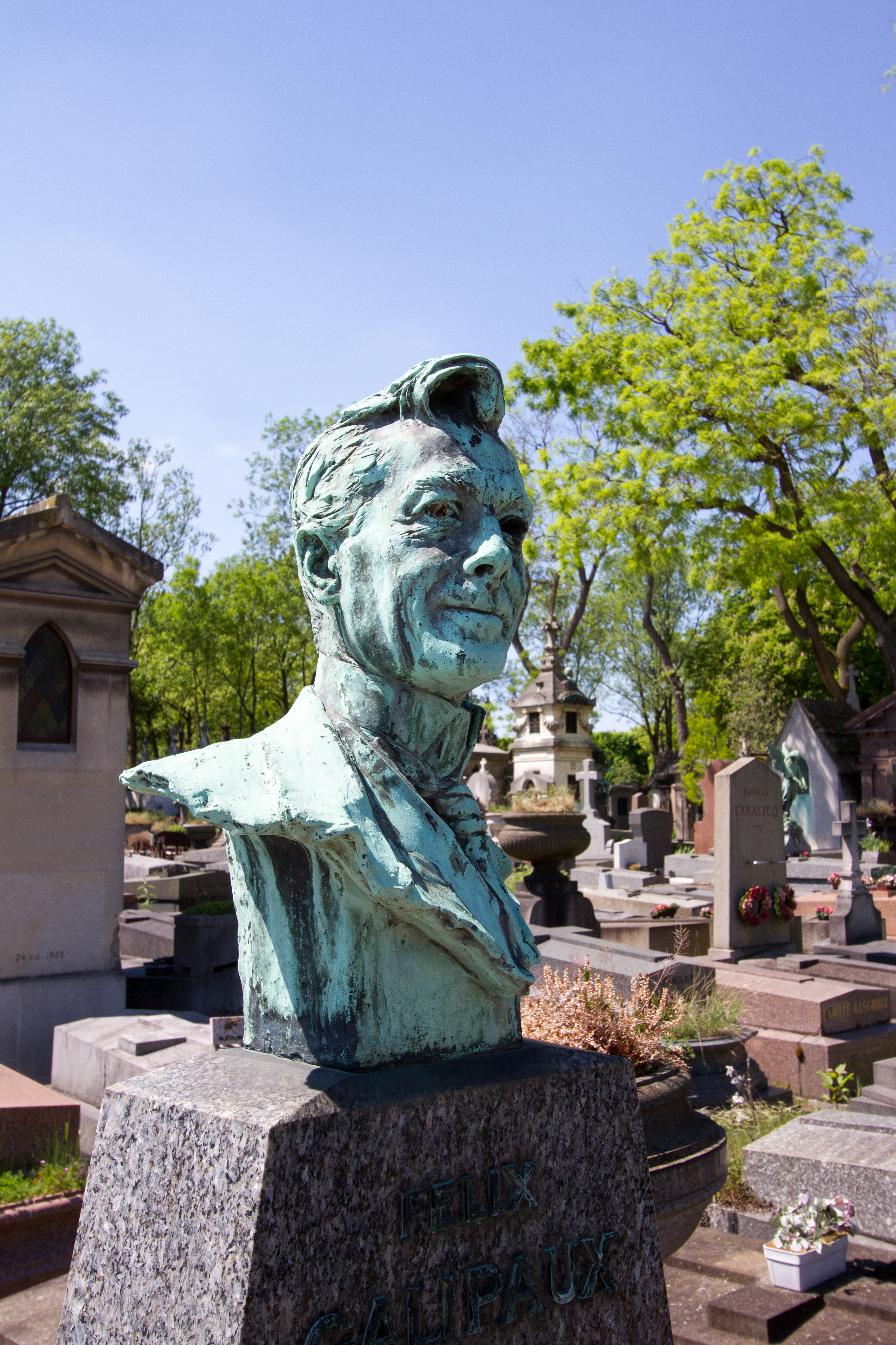 Sépulture de Félix Galipaux (1860-1931), dramaturge, romancier, comédien, humoriste et violoniste français.